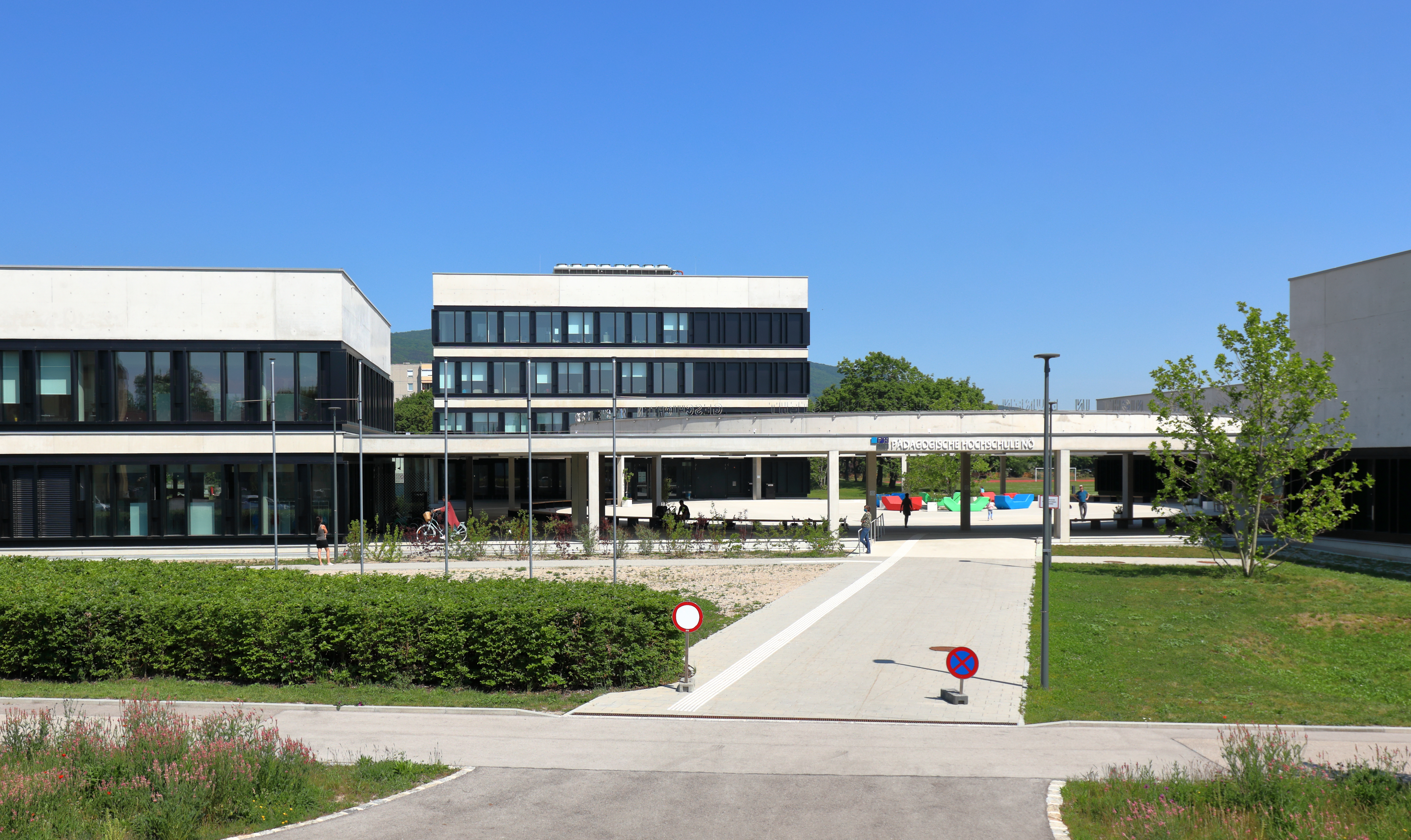 Der Campus Baden mit der Pädagogische Hochschule Niederösterreich in Baden bei Wien. Links die Praxisvolksschule, dahinter die Pädagogische Hochschule, rechts im Vordergrund der Sportstättentrakt und dahinter die Mensa.Errichtet wurde der Campus um rd. 45 Mio. Euro ab 2015 auf dem Gelände einer bereits bestehenden Pädagogischen Schule nach Plänen von Marte.Marte Architekten und der BIG als Bauherr. Der Campus besteht aus 4 Gebäuden; dem viergeschossigen Hochschulgebäude (Fertigstellung Frühsommer 2017), der Mensa (Fertigstellung Sommer 2016), der zweigeschossigen Praxisvolksschule mit neun Klassenräumen sowie zwei Sonderunterrichtsräumen (Fertigstellung August 2016)) und dem bereits bestehenden Sportstättentrakt samt Schwimmbad, der generalsaniert wurde (Übergabe Ende 2017). Der teilweise überdachte Campusplatz bzw. Vorplatz wurde bis Ende April 2018 fertiggestellt, nachdem vorher (Sommer-Herbst 2017) das darauf befindliche alte Hochschulgebäude abgetragen wurde. Am 24. Mai 2019 fand die feierliche Eröffnung statt.